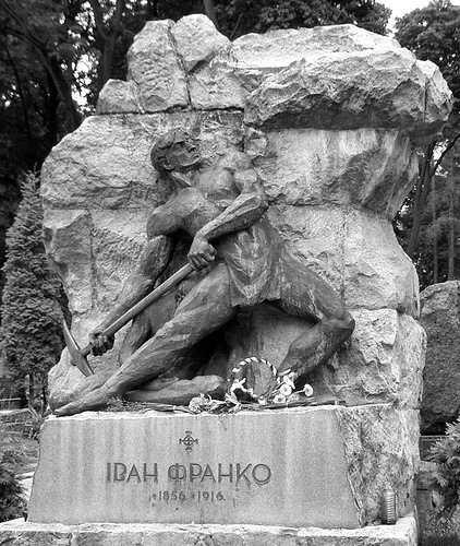 Могила Ивана Франко